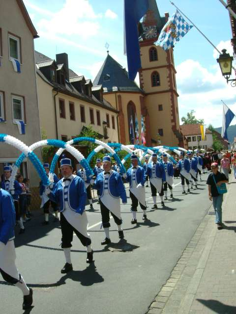 Außerplanmäßiger Auftritt der Stadtprozeltener Schäfflertanzgruppe anlässlich des historischen Stadtfestes am 09. und 10. Juli 2005.